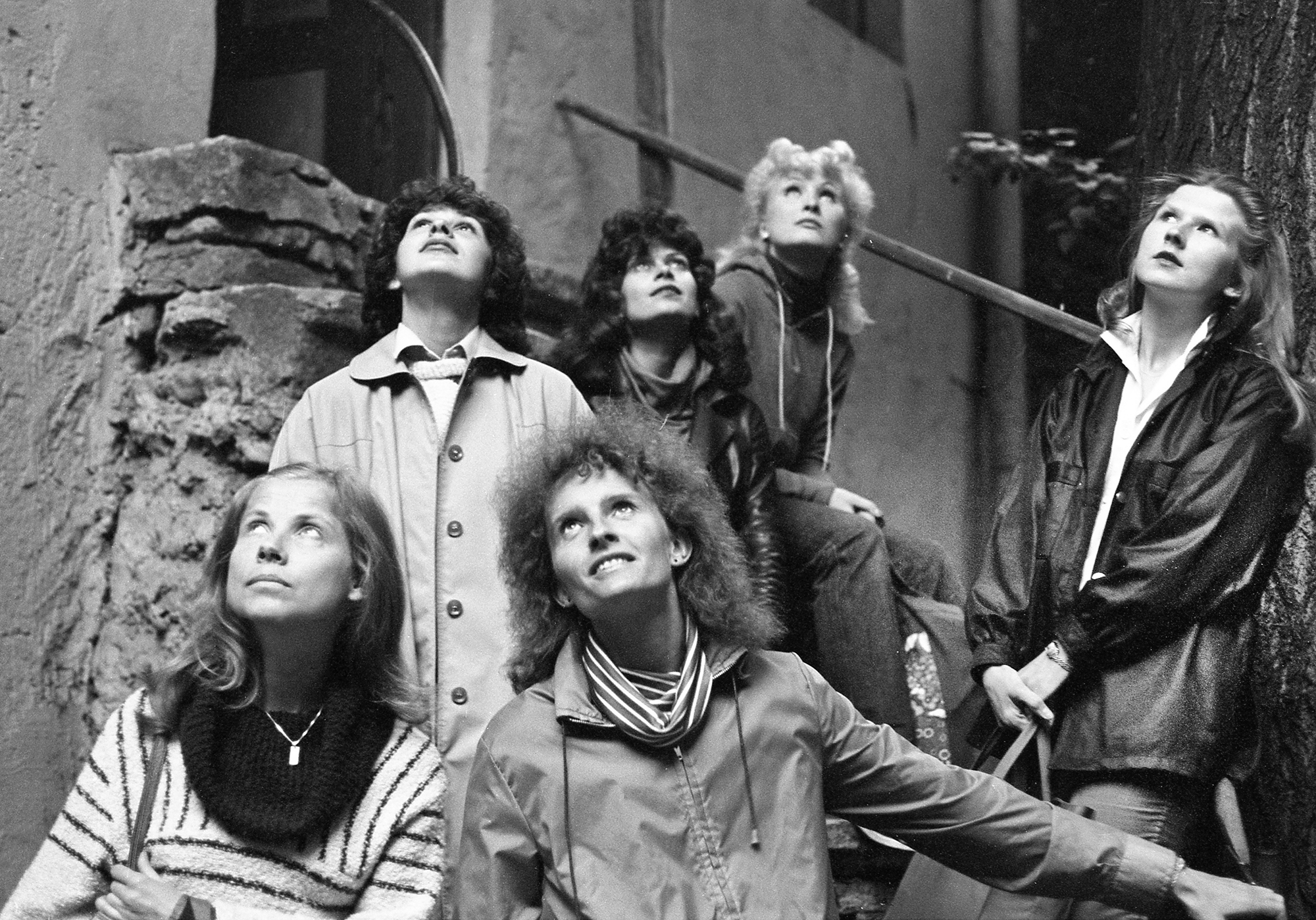 Reet Kudu (vasakult esimene) trupiga